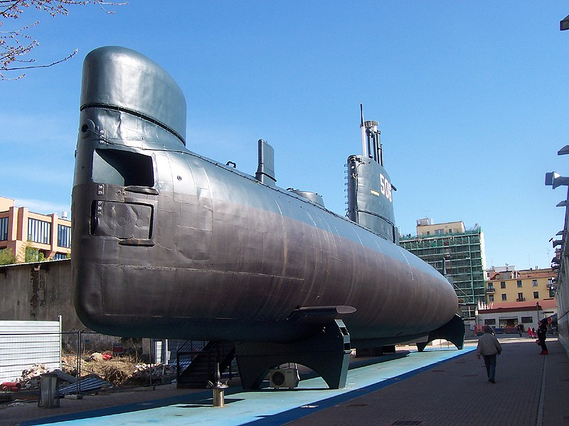 Milano - Sottomarino Toti al Museo della Scienza e della Tecnica "Leonardo da Vinci"